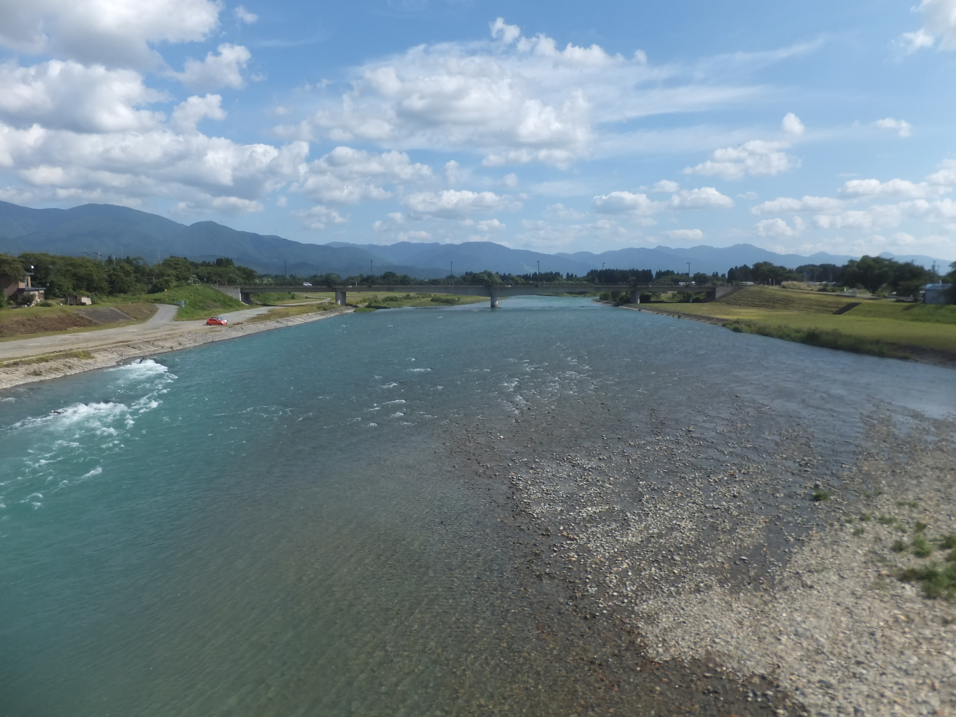 秋田県仙北市と大仙市の間を流れる玉川(左岸が仙北市、右岸が大仙市)。田沢湖線第一玉川橋梁より。